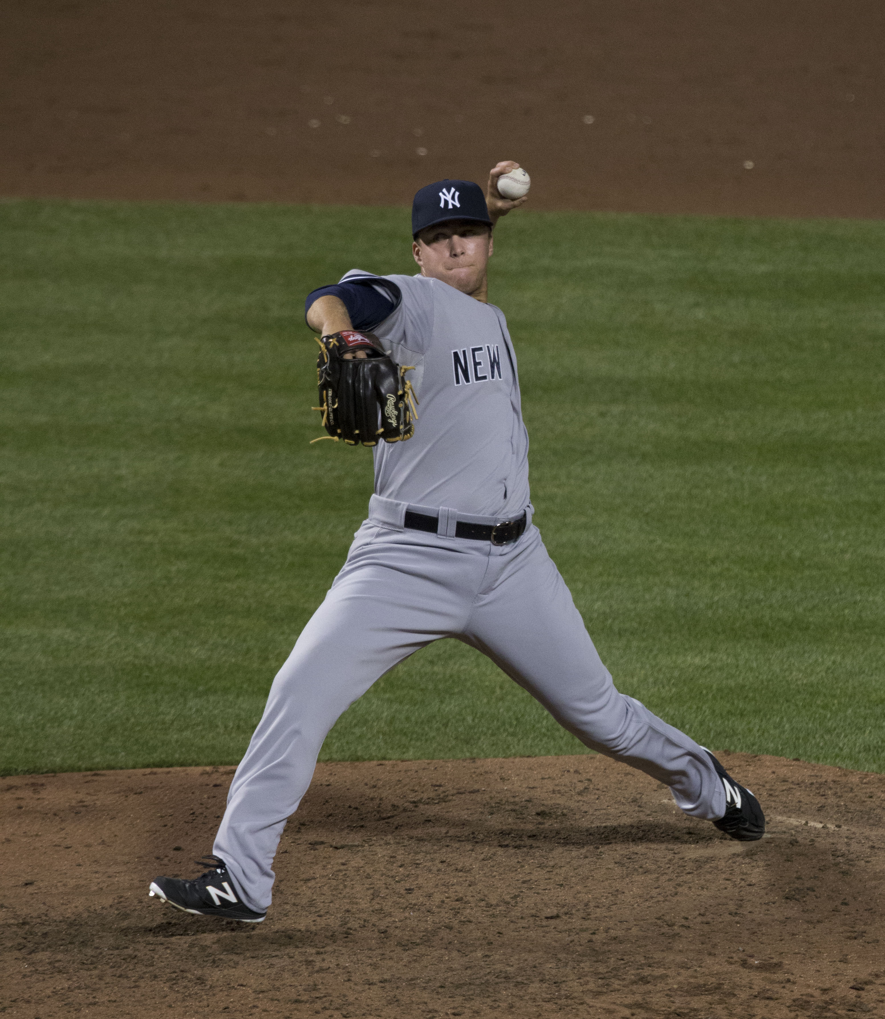 Yankees at Orioles 6/12/15